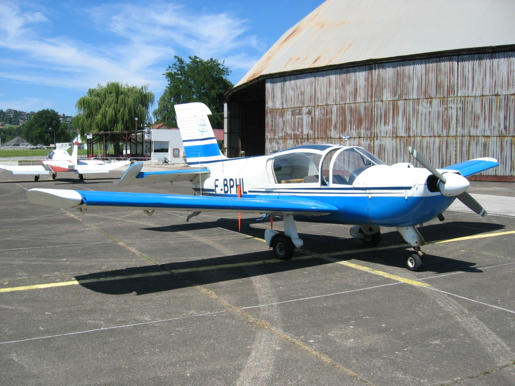 Avion de tourisme Morane-Saulnier Rally MS893 - aéro-club de Besançon Thise